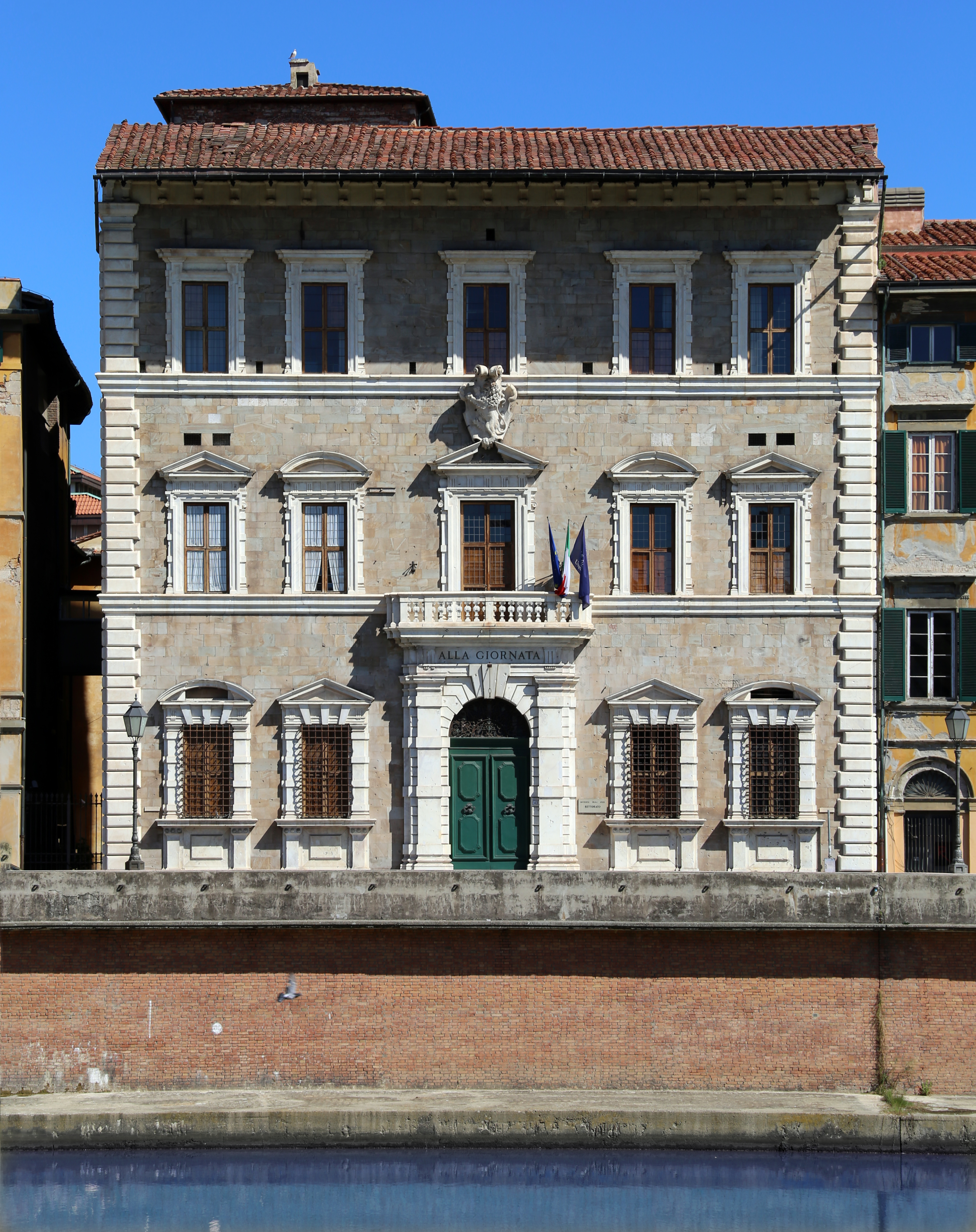 Palazzo alla Giornata This is a photo of a monument which is part of cultural heritage of Italy.